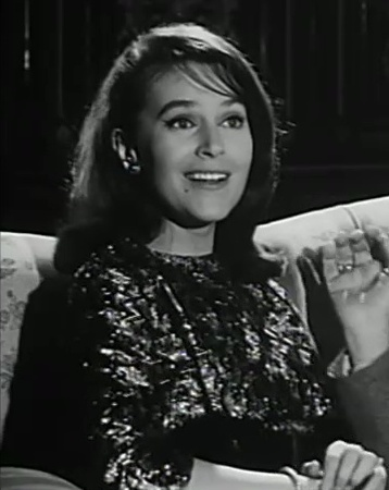 Scena del film Totò Diabolicus (1962)